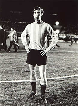 Carlos Bilardo in Argentina colours in 1959